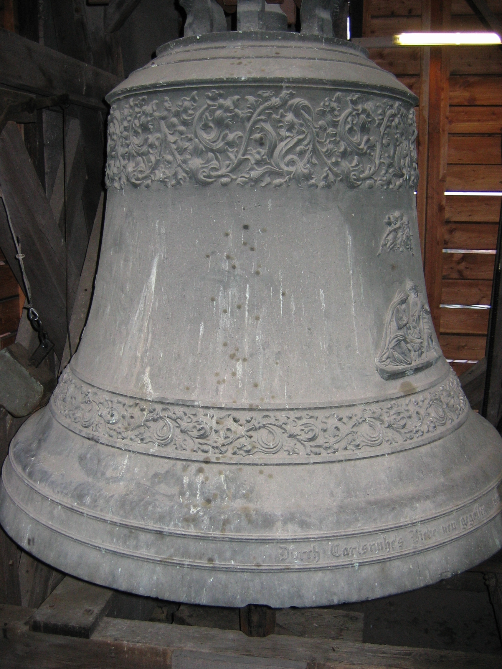 Weihnachtsglocke (Ludwig) der Stephanskirche zu Karlsruhe.